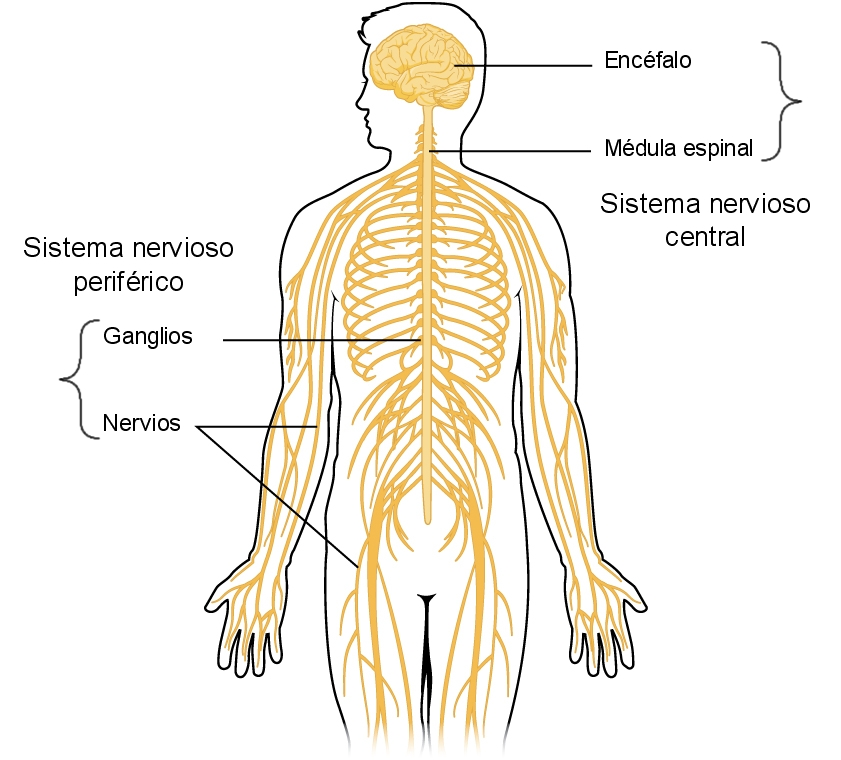 Esquema general del sistema nervioso central y sistema nervioso periférico.